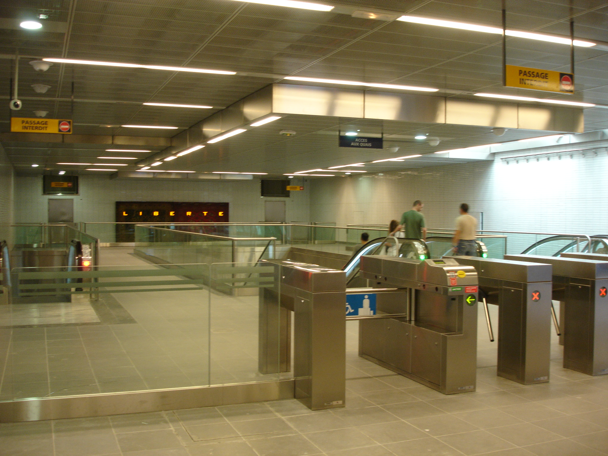 Toulouse (Haute-Garonne, France) : metro station Palais de Justice.